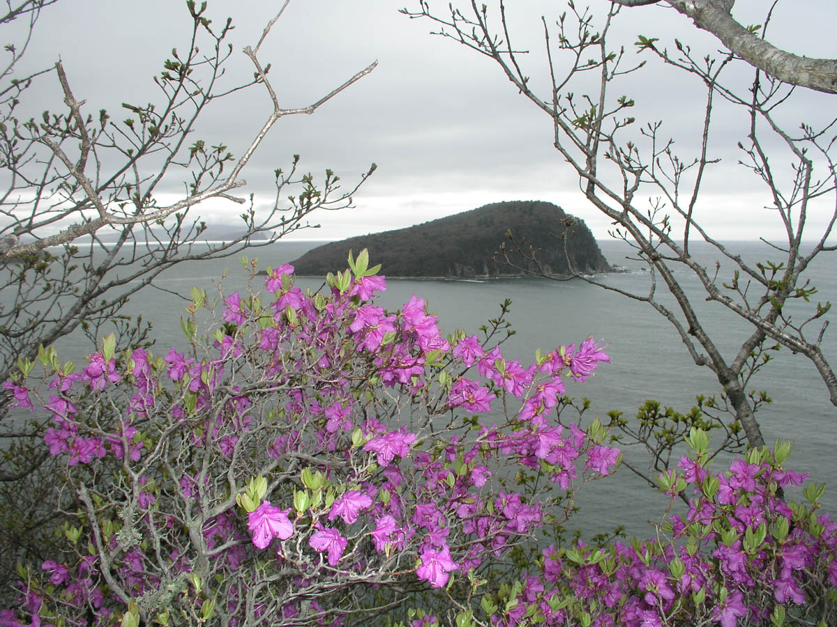 Вид на остров Петрова с точки, находящейся в километре от кордона "Петров" Лазовского заповедника. На переднем плане - Рододендрон сихотинский